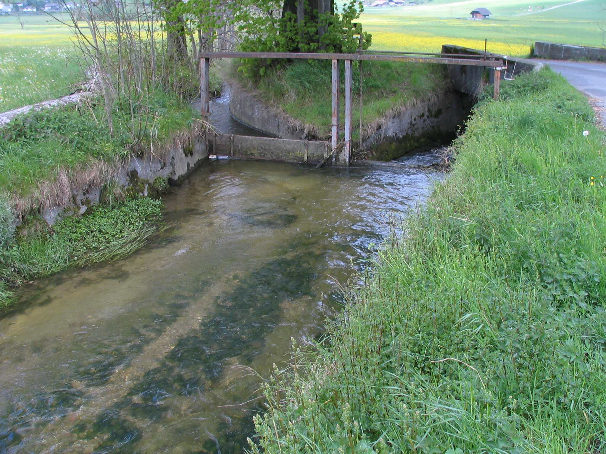 Verzweigung des Biglenbachs zwischen Biglen und Walkringen